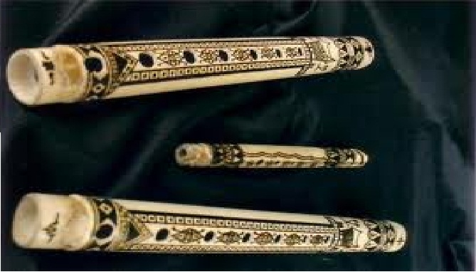 Bangsi Alas alat musik tiup dari Aceh Tenggara